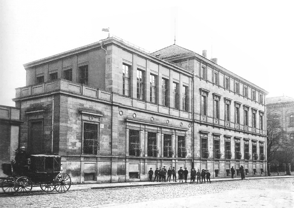 Bis 1896 Chemisches Institut in der Maxstraße 4, bis 1910 als Ausweichgebäude für die benachbarte Maxschule [1] und ab 1913 als Fränkisches Luitpold-Museum genutzt